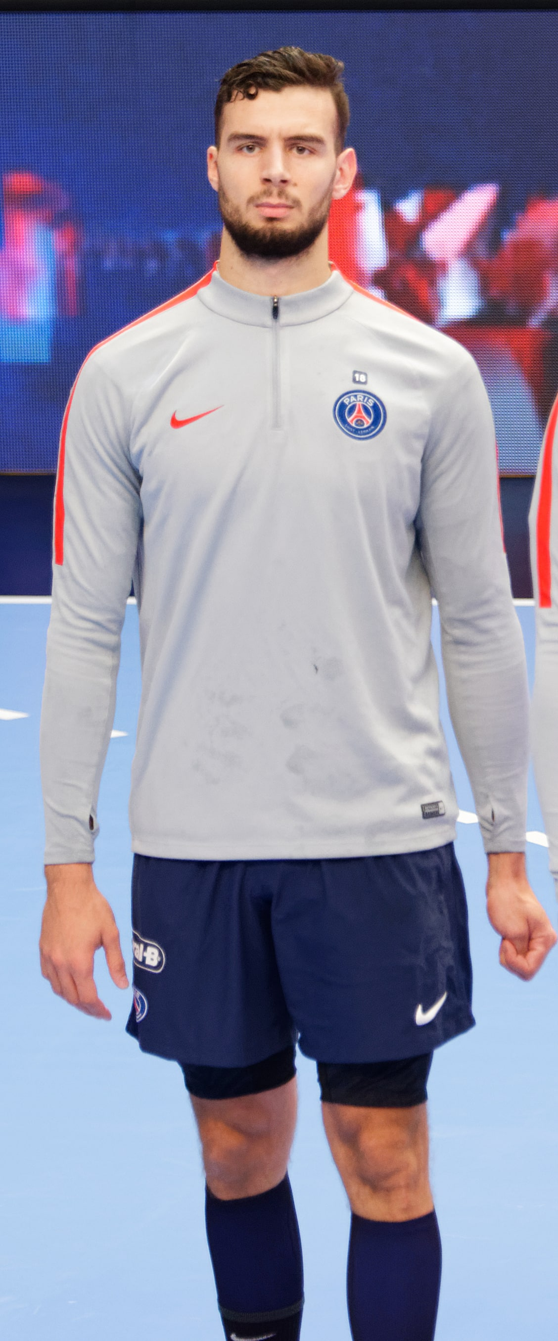 Match entre le PSG Handball et le Meshkov Brest. Le 24 septembre 2017.